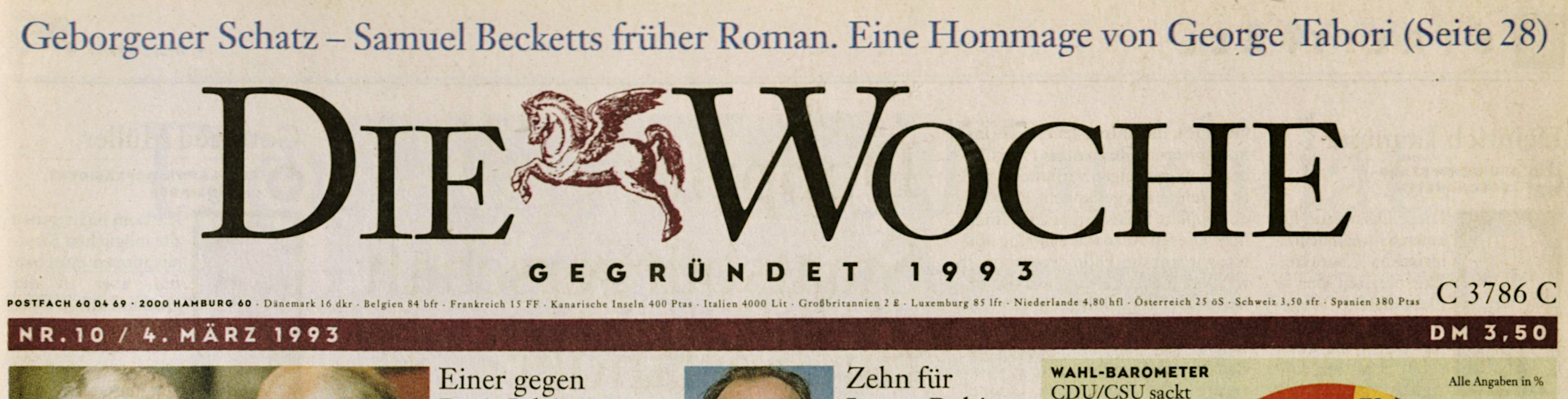 Zeitungkopf "Die Woche", Ausgabe 10/1993. Jahreszeitenverlag, Chefredaktion und Herausgeber: Manfred Bissinger. Entwurf des Kopfes: Neville Brody 1992 unter Verwendung eines Pegasus aus dem 16. Jahrhundert.